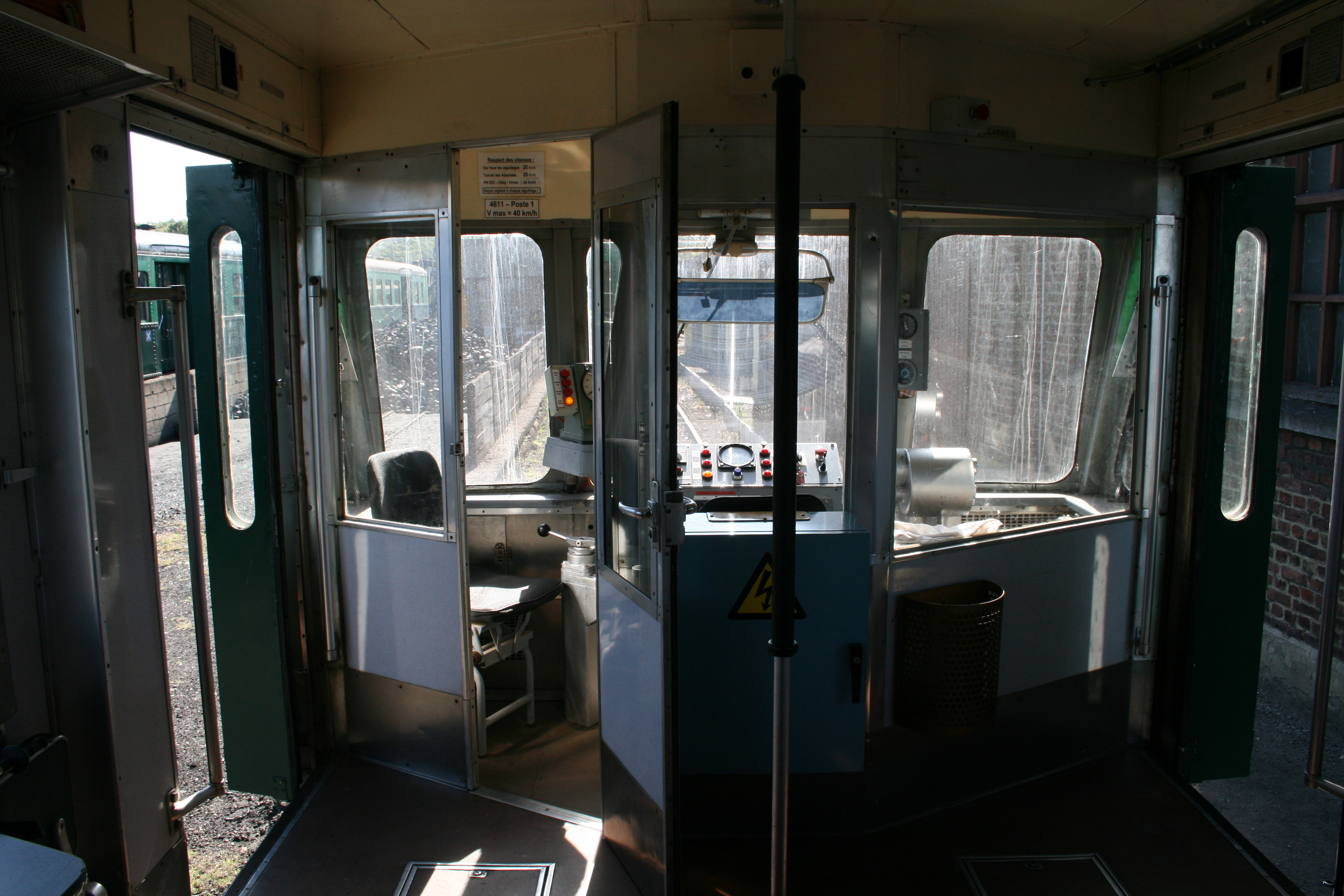 Autorail diesel 554.11 de la ligne touristique du Chemin de Fer à Vapeur des 3 Vallées - Cabine de pilotage.